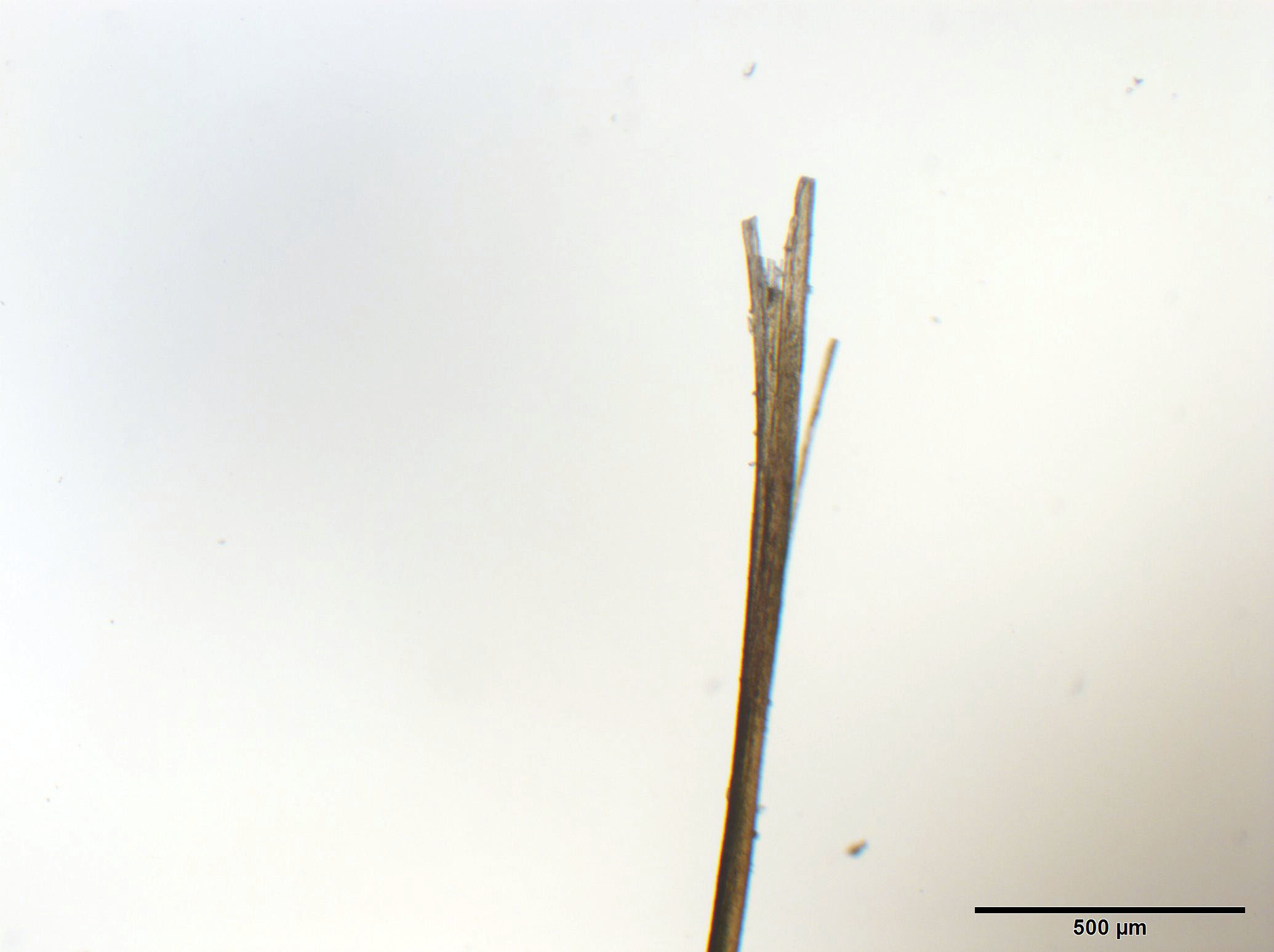 Ein gespaltenes/splissiges Haar meiner Kollegin